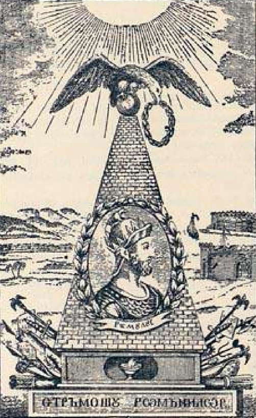 Romulus - Revista "Biblioteca românească" întocmită de Zaharia Carcalechi, Buda 1821